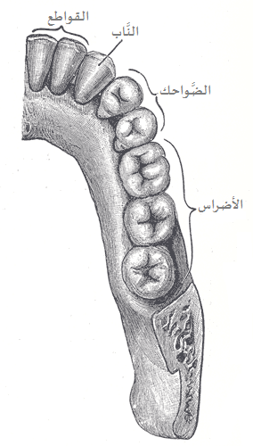 الأسنان الدائمة لِلنصف الأيمن من الفك السُفلي عند الإنسان، كما تبدو لِلناظر من فوق.